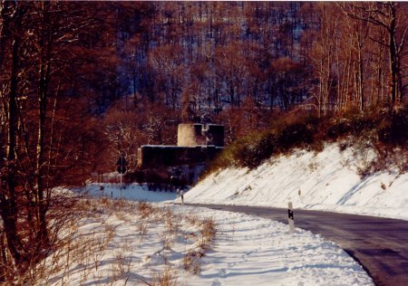 Die Sprengelburg zwischen Essweiler und Oberweiler im Tal